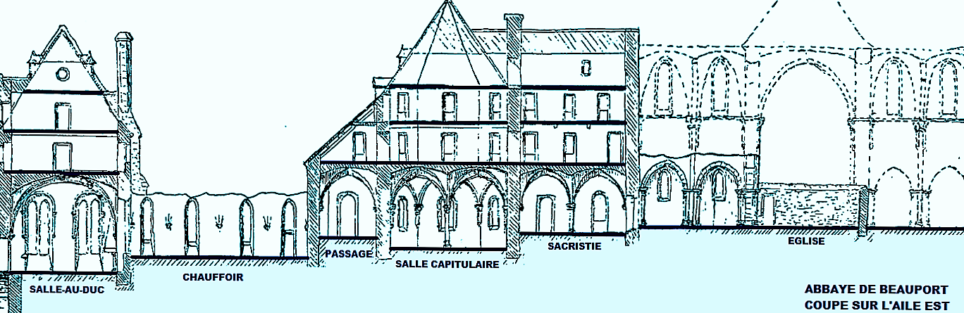 Paimpol (22), Abbaye de Beauport, Coupe sur l'aile Est de l'abbaye (image du domaine public modifiée)